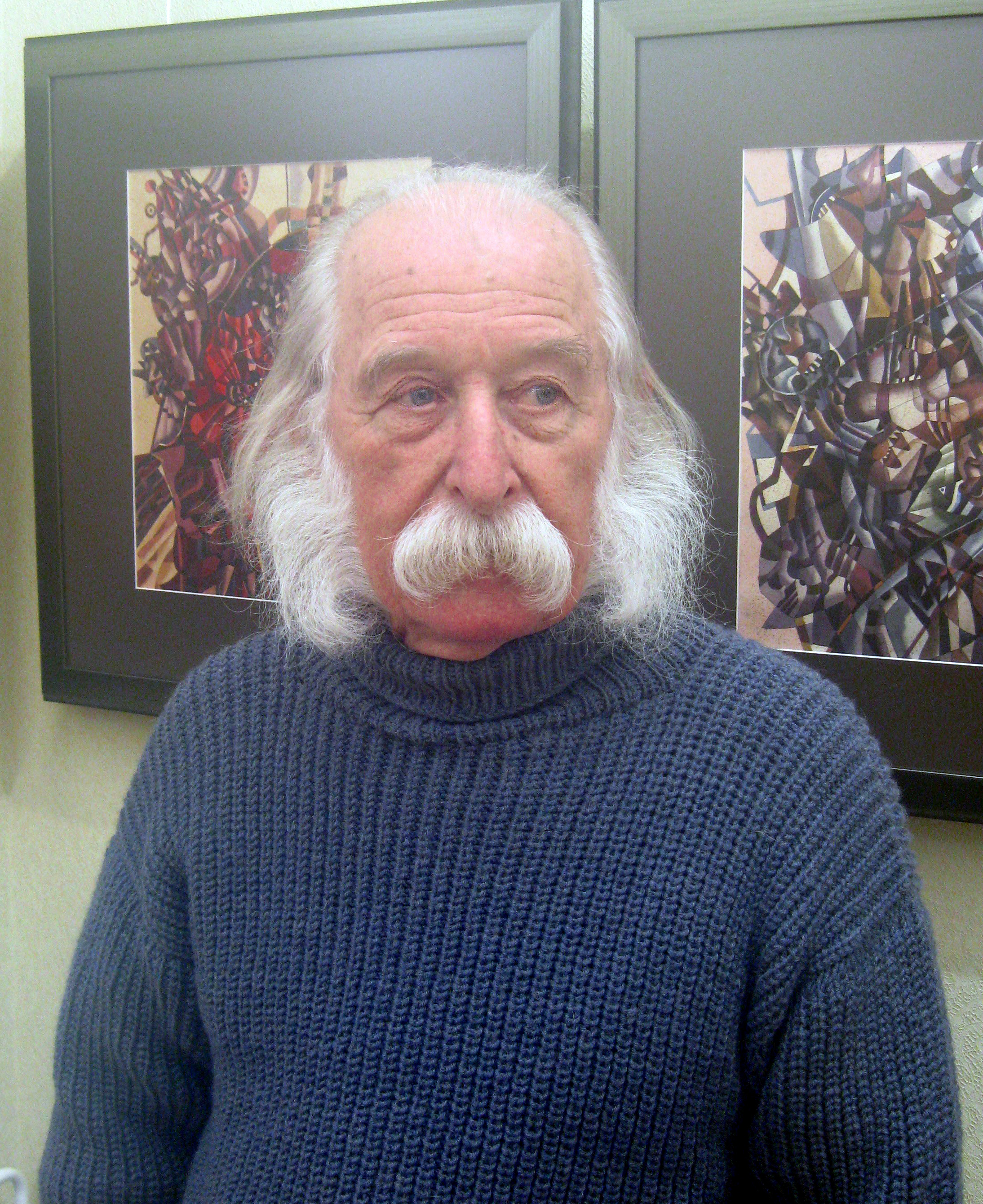 Художник Іван Марчук, Київ, галерея "Мистецька збірка"